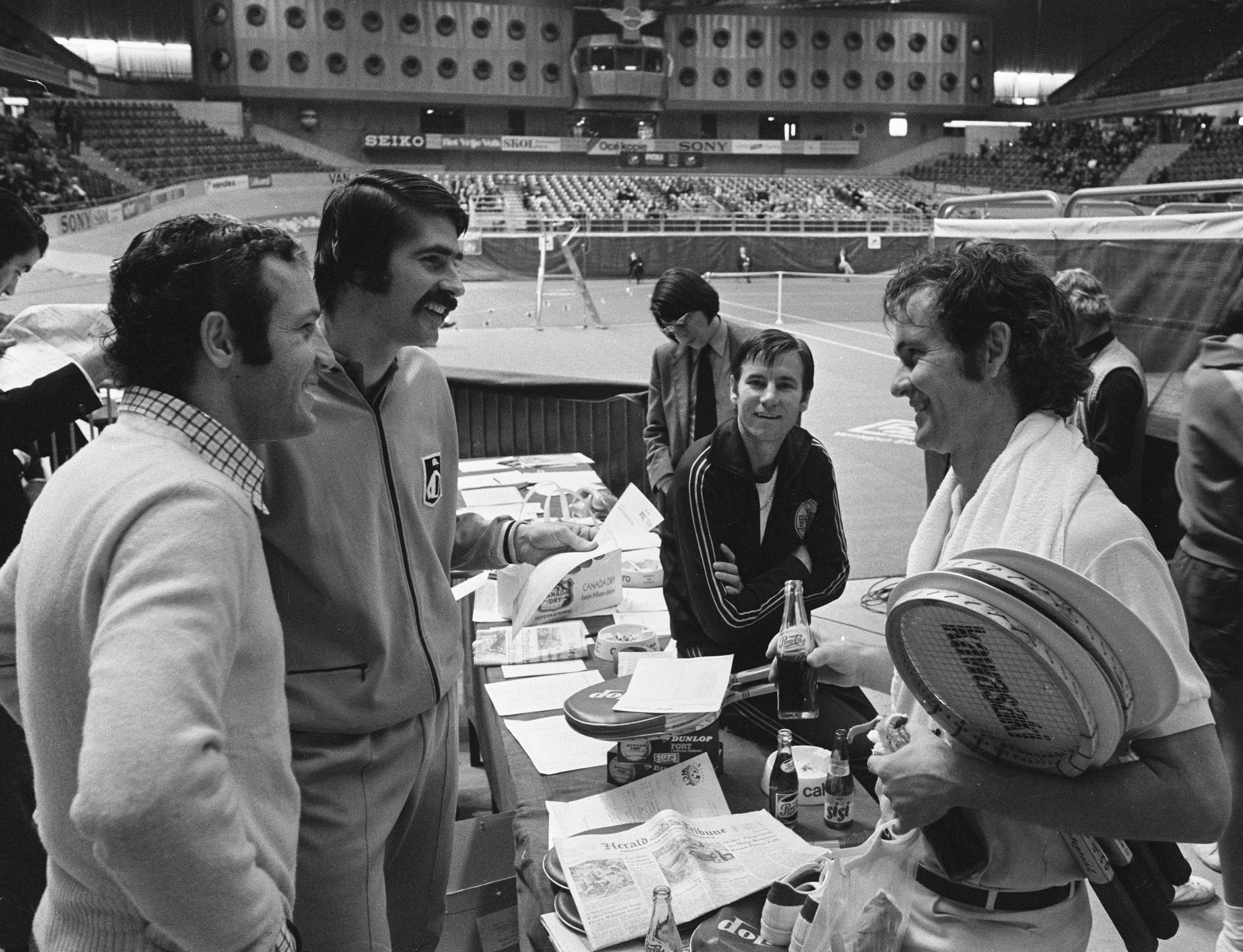 Proftennis in Ahoyhal, Rotterdam, v.l.n.r. Okker, Riessen, Pilic, Richey